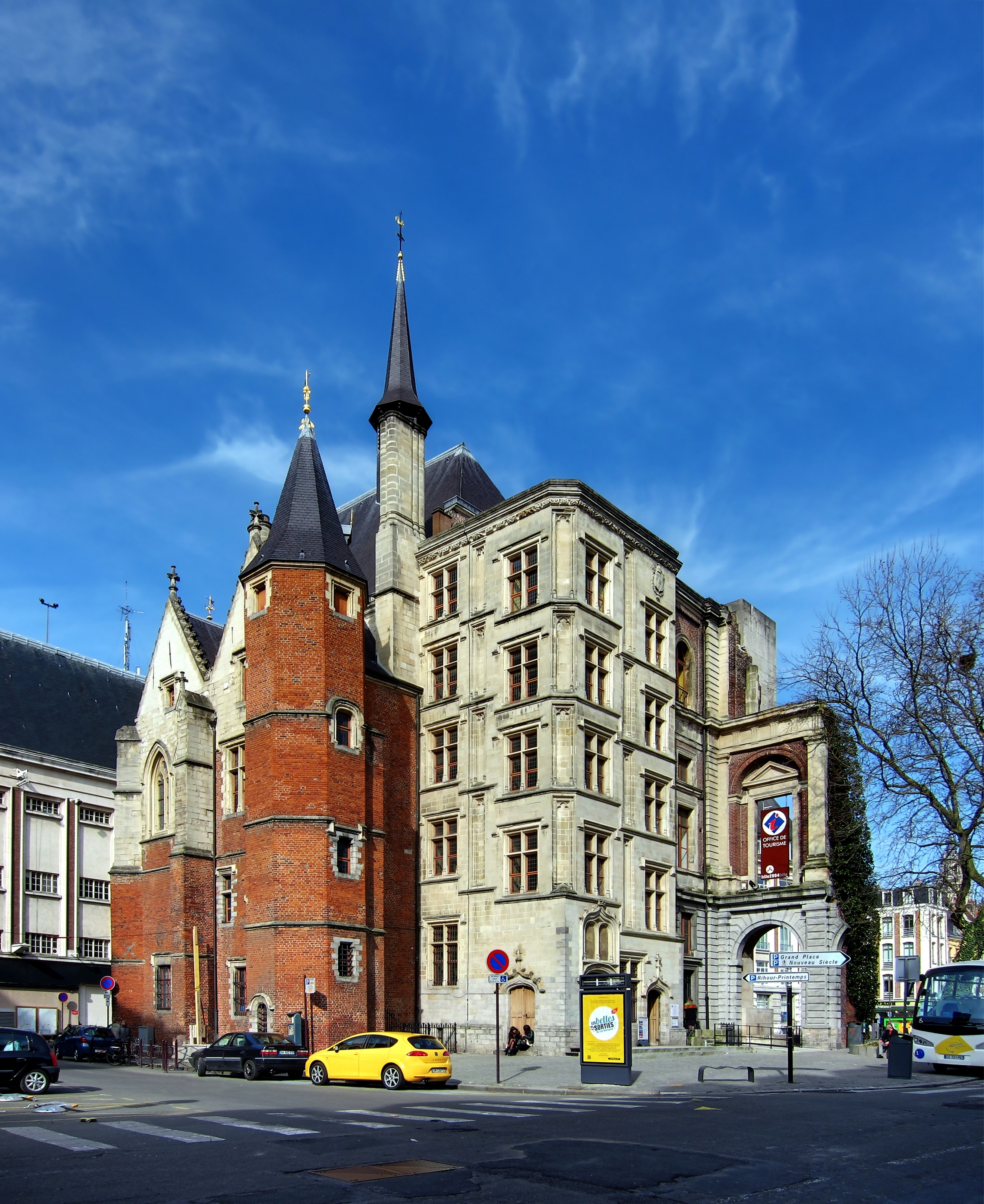 Le Palais Rihour à Lille (Nord), vestiges du palais des ducs de Bourgogne construit au 15ème siècle sur les plans de l'architecte Evrard de Mazières, qui accueille à présent l'Office du Tourisme.